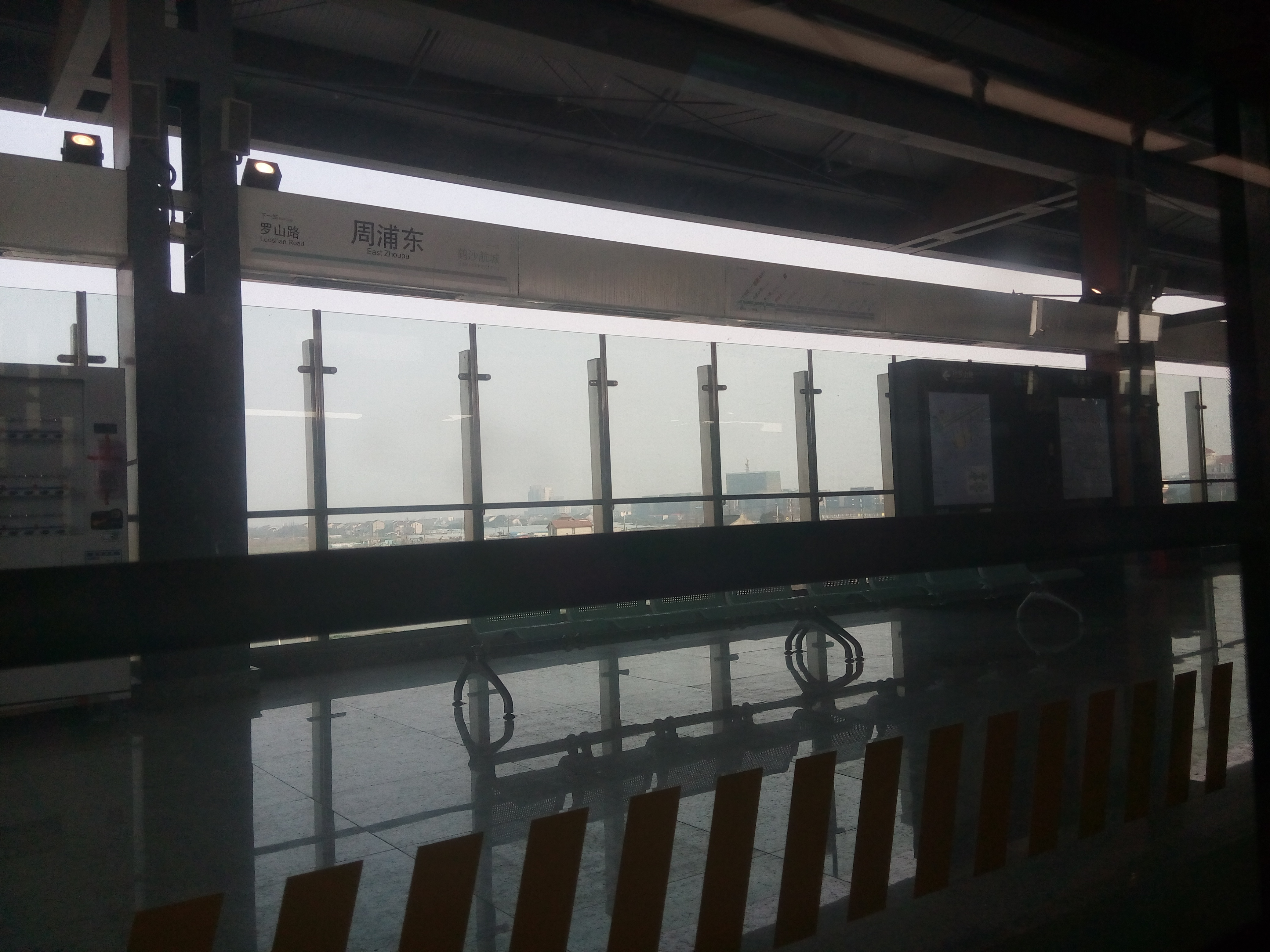 周浦东站 罗山路方向列车拍摄 罗山路方向站台